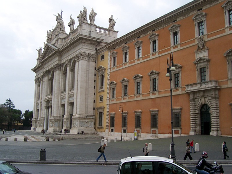 Roma - Basilica di S. Giovanni in Laterano vista dalla Scala Santa